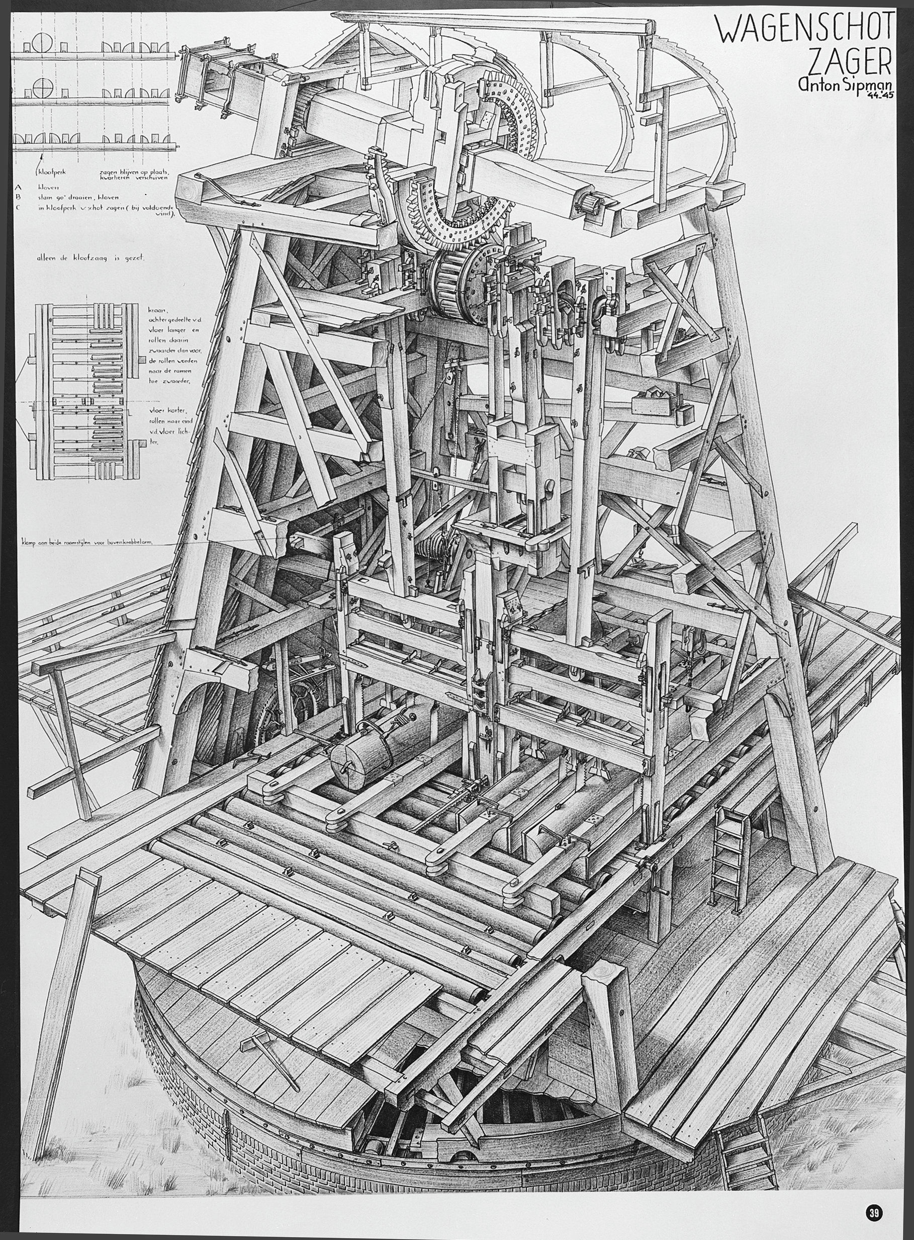 Diversen: Wagenschot Zager, tekening A.Sipman (1944-1945)